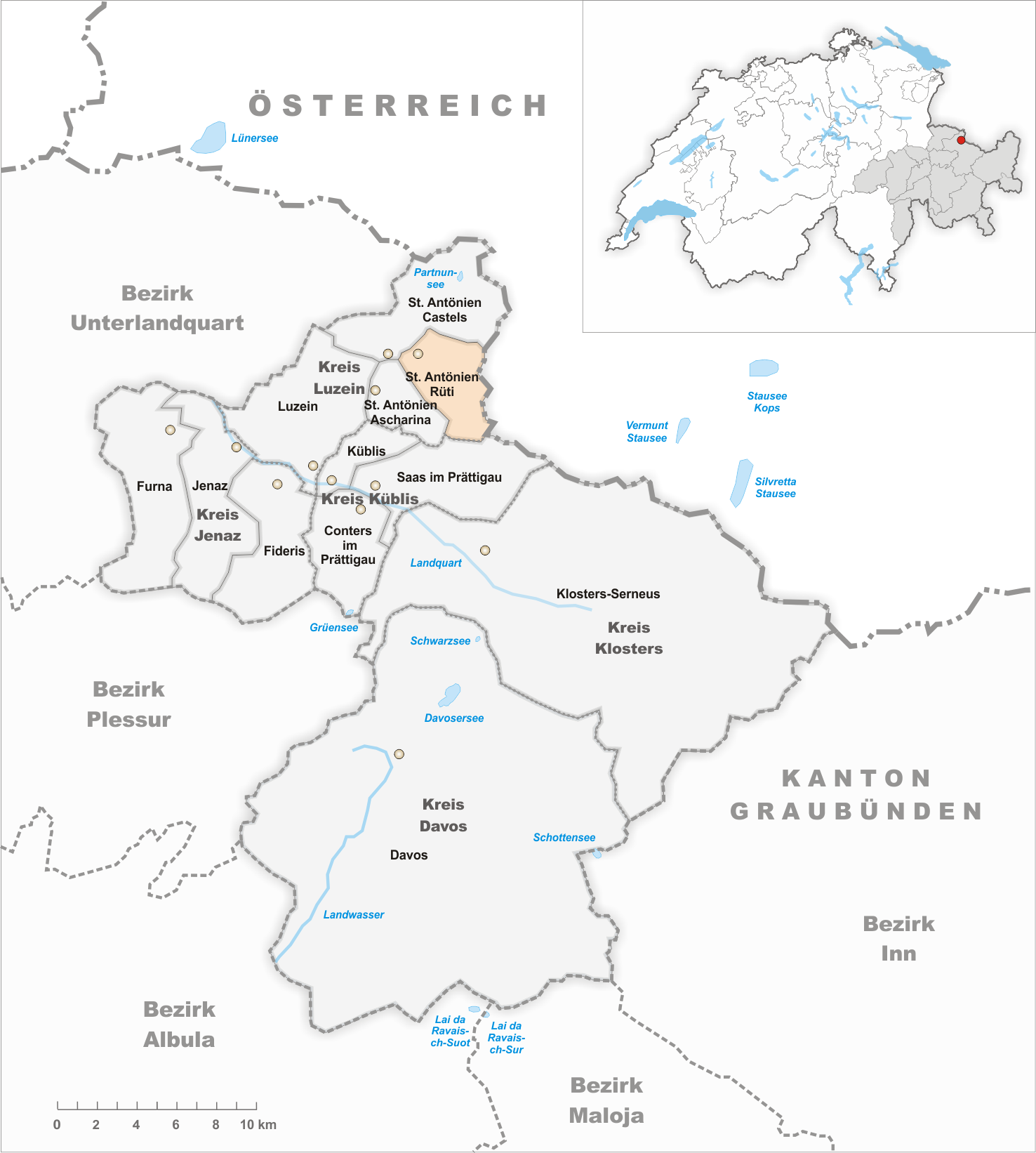 Municipality St. Antönien Rüti Artist: Tschubby